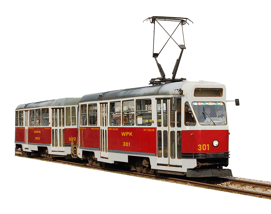 Rekonstrukcja wyglądu katowickich tramwajów typu 14N+14ND. Rekonstrukcję wykonano na podstawie zdjęć archiwalnych ze strony phototrans.eu. Wykorzystano zdjęcie: File:Warszawski tramwaj w drodze do pętli Wyścigi - panoramio.jpg autorstwa Zdzisława Adama Niedźwiedzkiego.